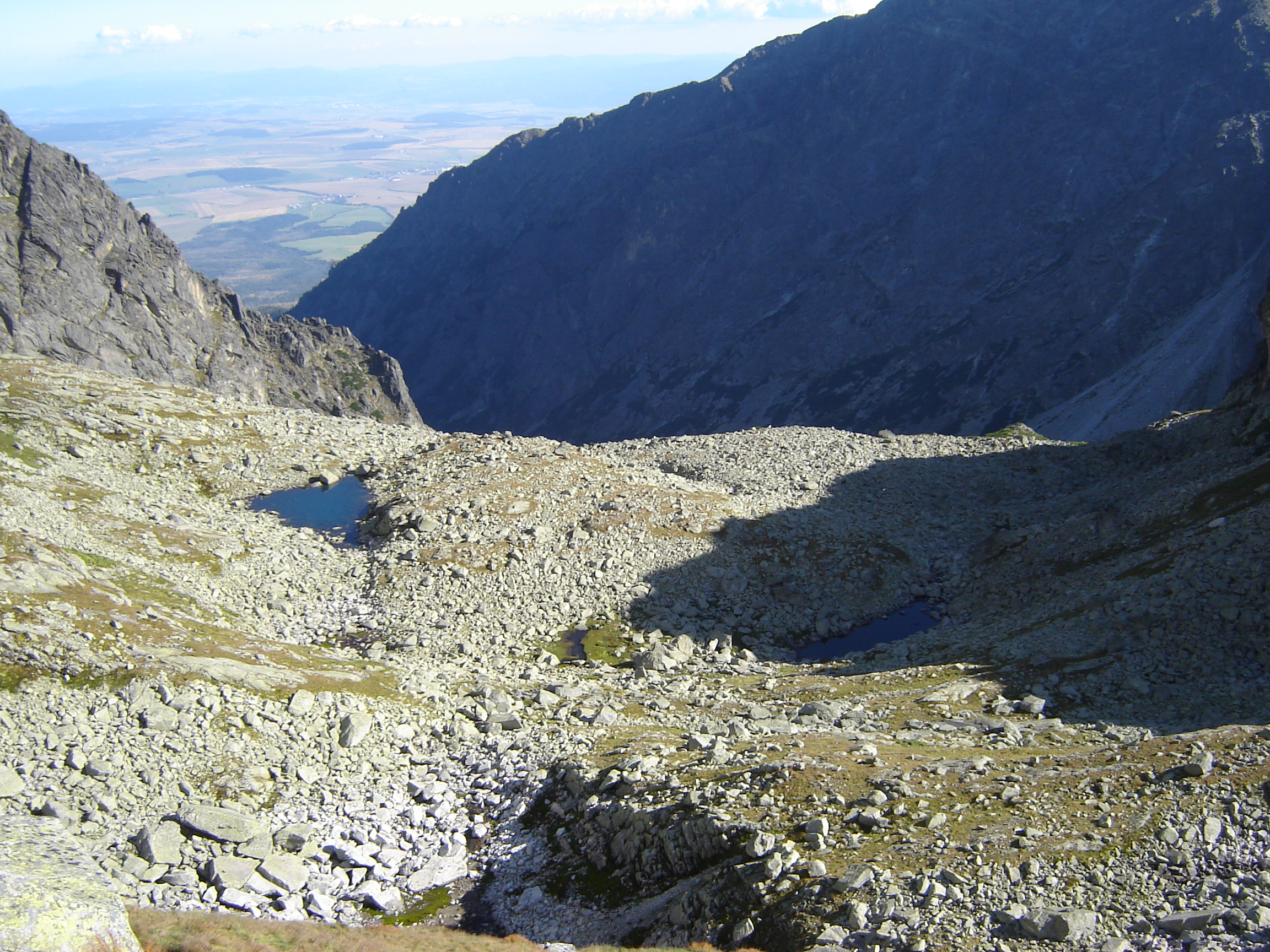 Nižné Strelecké plesá